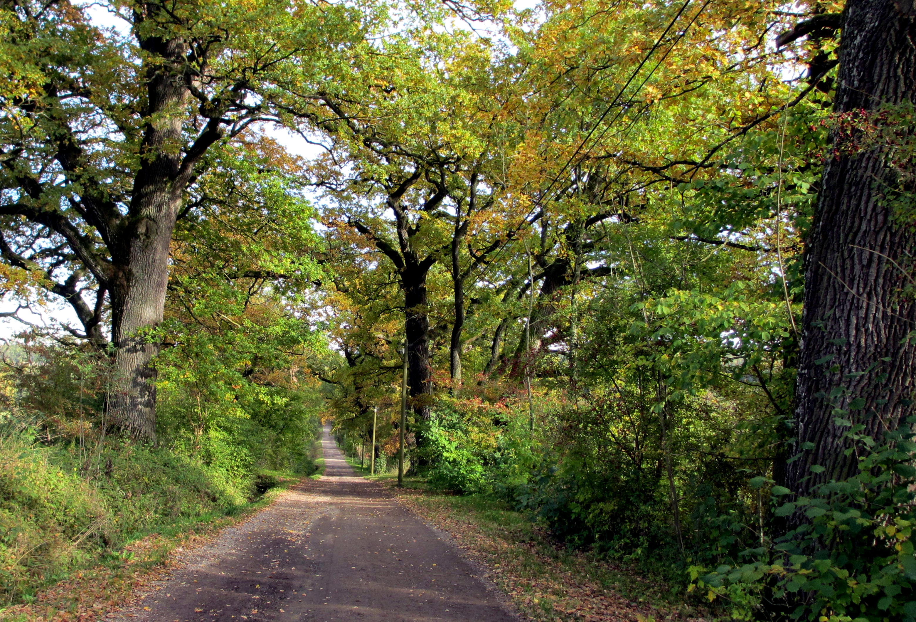 Graf Anton Clemens von Toerring (1725-1812), Schlossherr auf Schloss Seefeld, war als weit gereister Landwirtschaftsexperte Präsident der Bayerischen Akademie der Wissenschaften. In Mecklenburg und Ostpreußen beeindruckten ihn die Alleen, die Friedrich Wilhelm der I. als schattenspendende Heerstraßen hatte anlegen lassen. In den 1770er Jahren übernahm er diese Idee für friedlichere Zwecke und ließ 765 Eichen entlang des Weges pflanzen, der sein Schloss mit dem damals dazugehörigen Gut Delling und der Schwaige Ettenhofen verband. Bei dem Teil der Straße, der zwischen Seefeld und Delling verläuft, ist wegen der Schadstoffbelastungen durch den Verkehr die Pflege der Bäume für das Straßenbauamt inzwischen zu einer kostspieligen Daueraufgabe geworden. Zwischen Delling und Ettenhofen hat sich der ursprüngliche Charme der Allee erhalten. Statt auf Kraftfahrzeuge trifft man hier nur hin und wieder auf Wanderer. This is a photograph of an architectural monument.